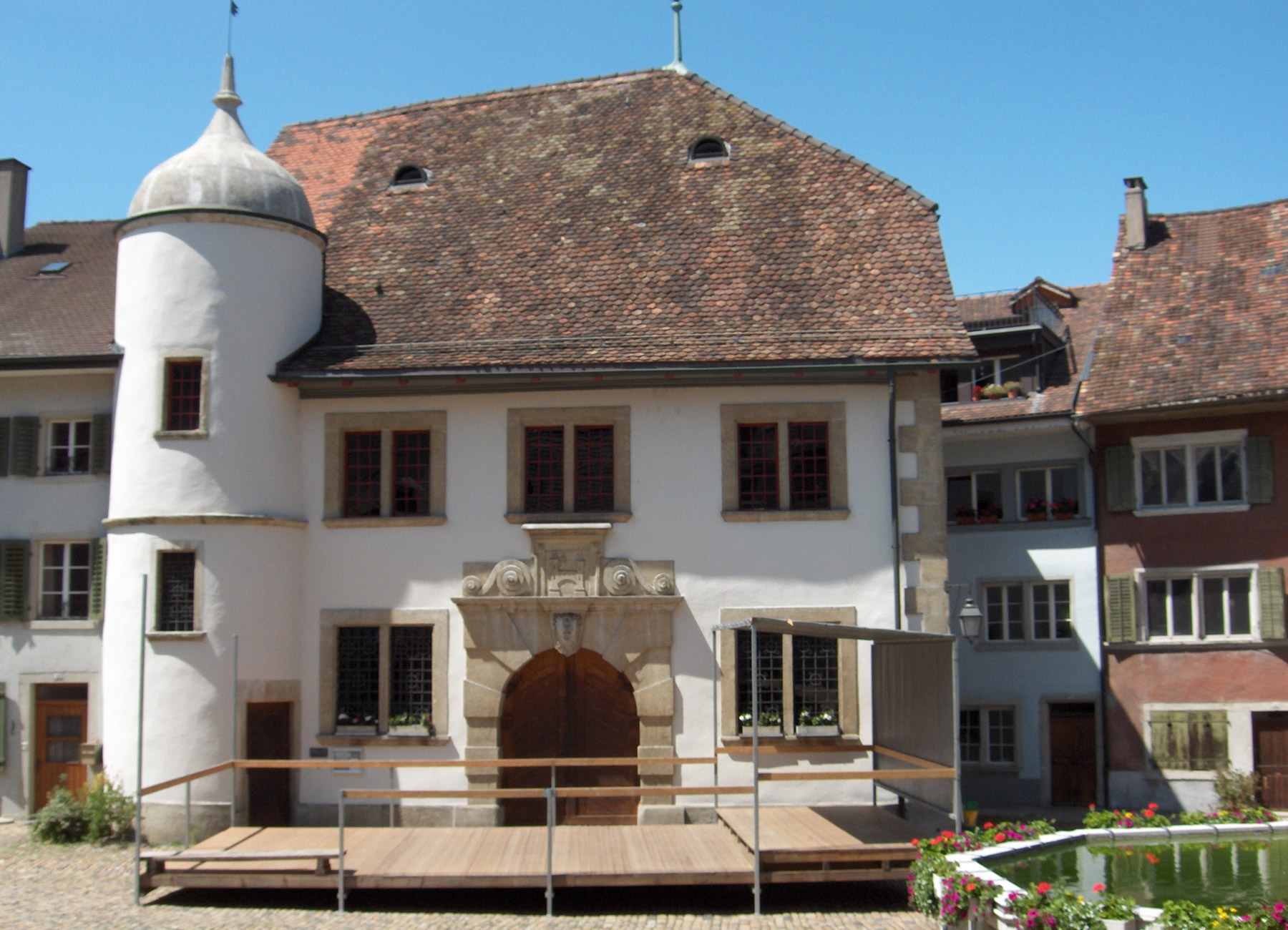 Brugg: Ehemaliges Zeughaus Fotografiert durch Voyager, 28. Juni 2006 Brugg: Former arsenal Photo taken by Voyager, 28 June 2006